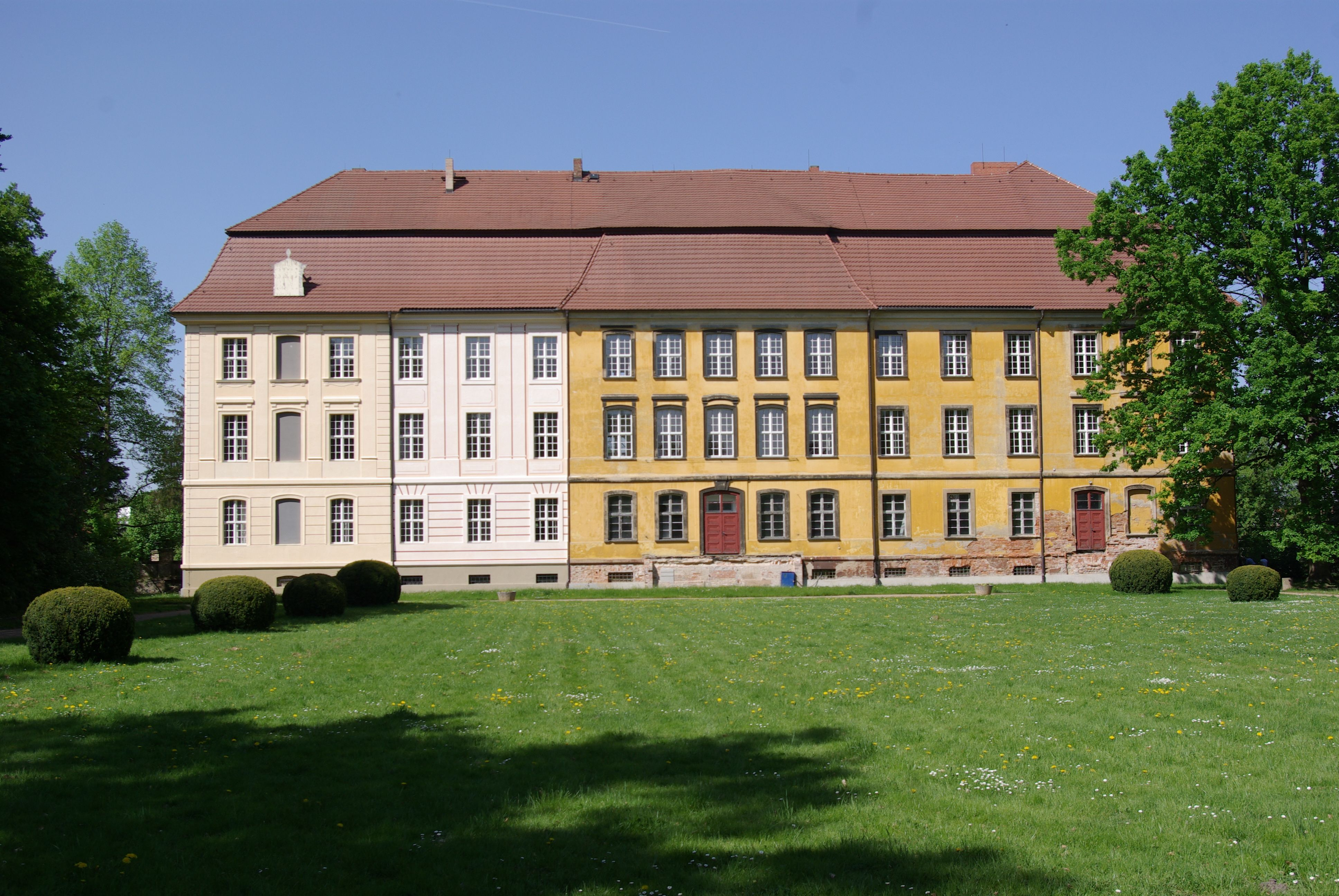 Lieberosre in Brandenburg. Das Schloss steht unter Denkmalschutz. Zu sehen ist der Südflügel von der Parkseite aus.